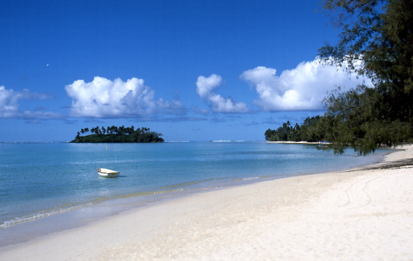 Muri-Beach mit vorgelagertem Motu auf der Insel Rarotonga, Cook Islands